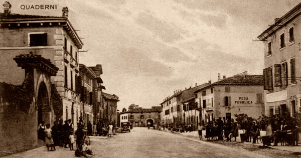 Quaderni (Vr) Via Mazzini foto scattata alla fine degli anni 20 del secolo scorso